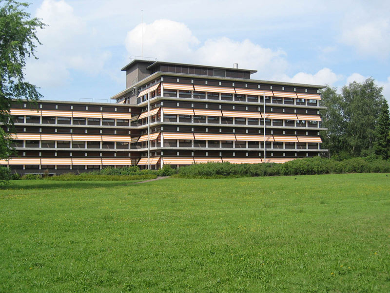 Het provinciehuis van de provincie Drenthe aan de Westerbrink 1 te Assen.